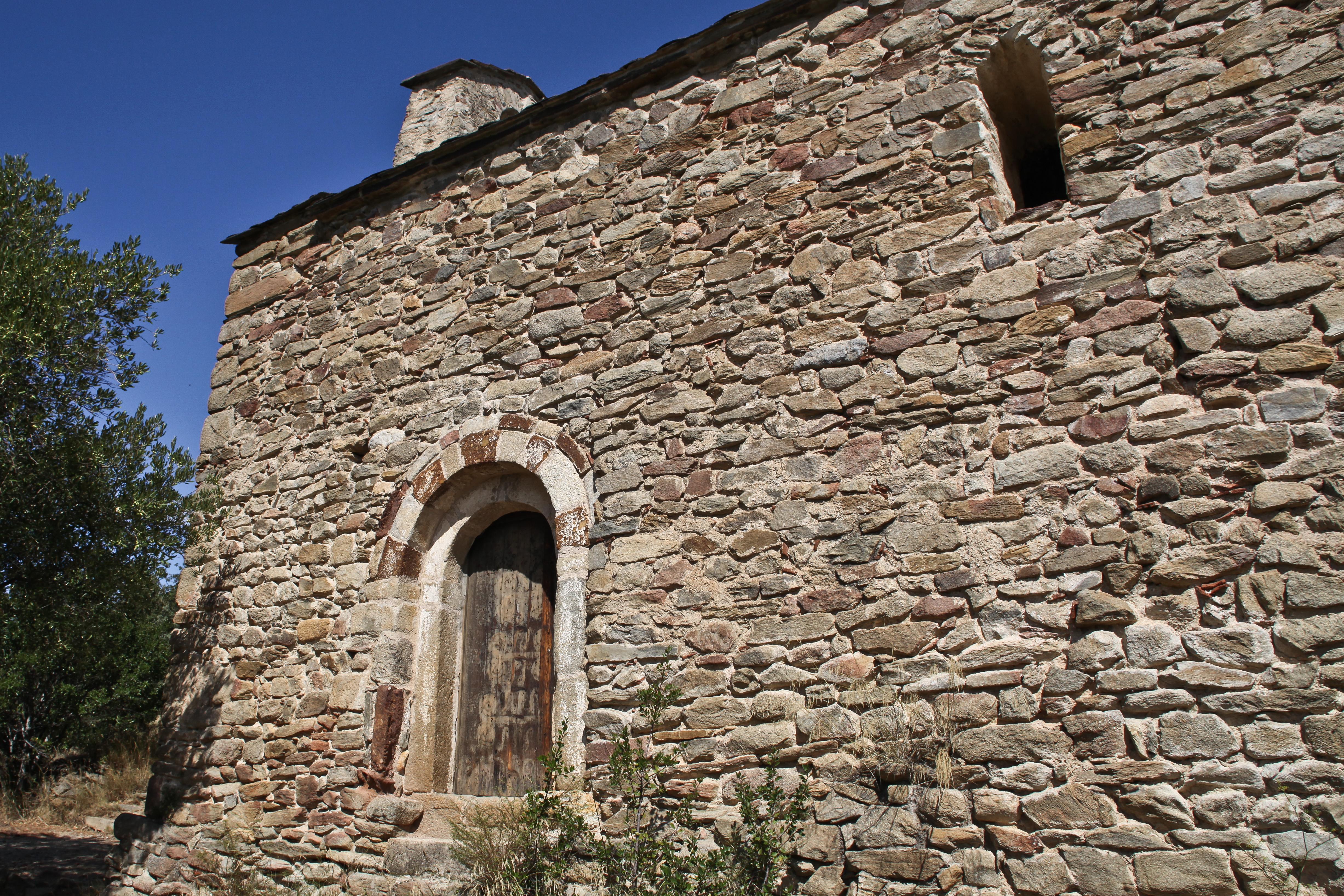 Entrée de l'église Saint-Pierre de Belloch, à Vinça, dans les Pyrénées-Orientales (France) .